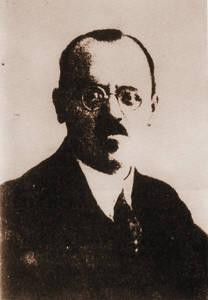 Juliusz Kłos